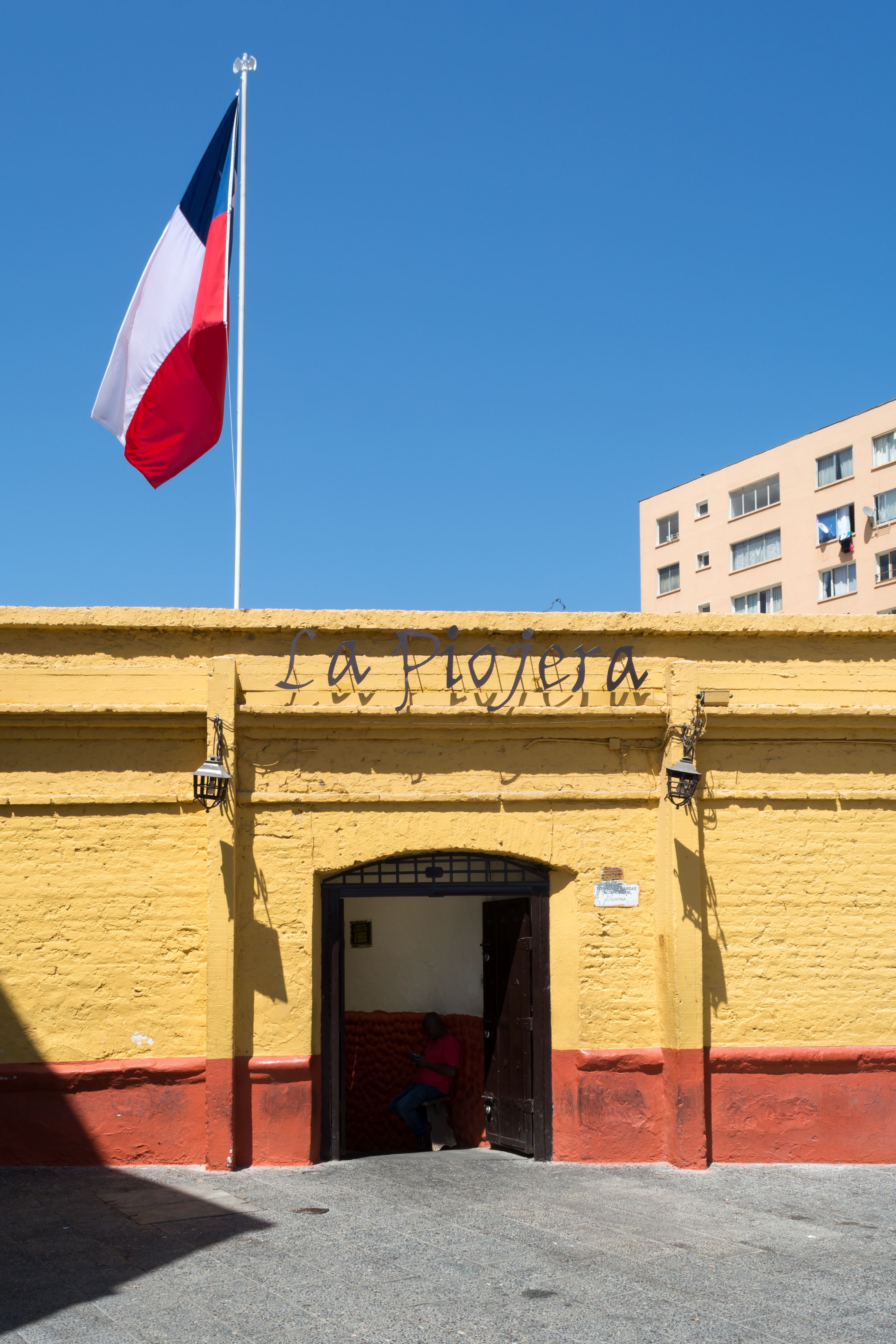 La Piojera, Santiago, Región Metropolitana, Chile